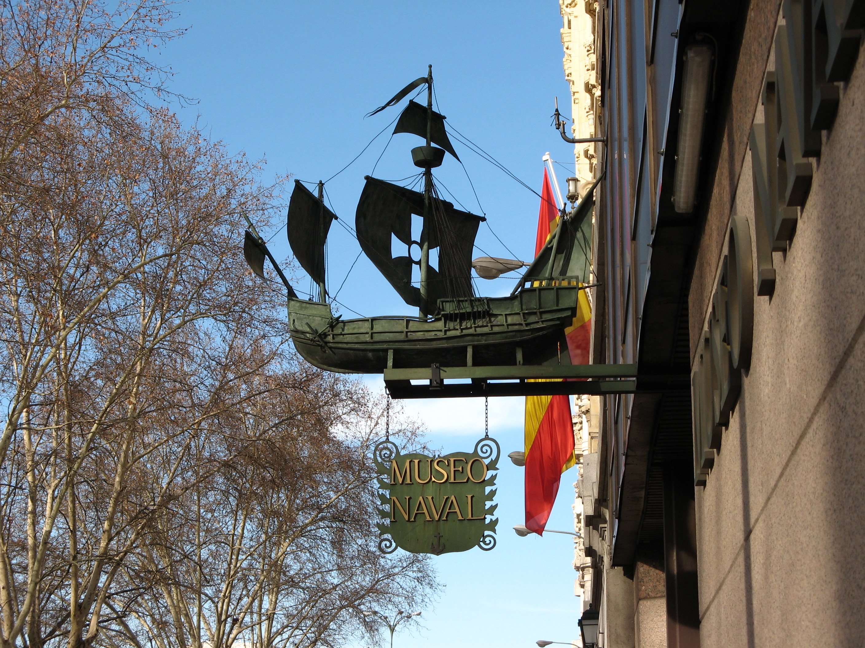 Museo Naval, en el Paseo del Prado de Madrid. Comunidad de Madrid, (España).